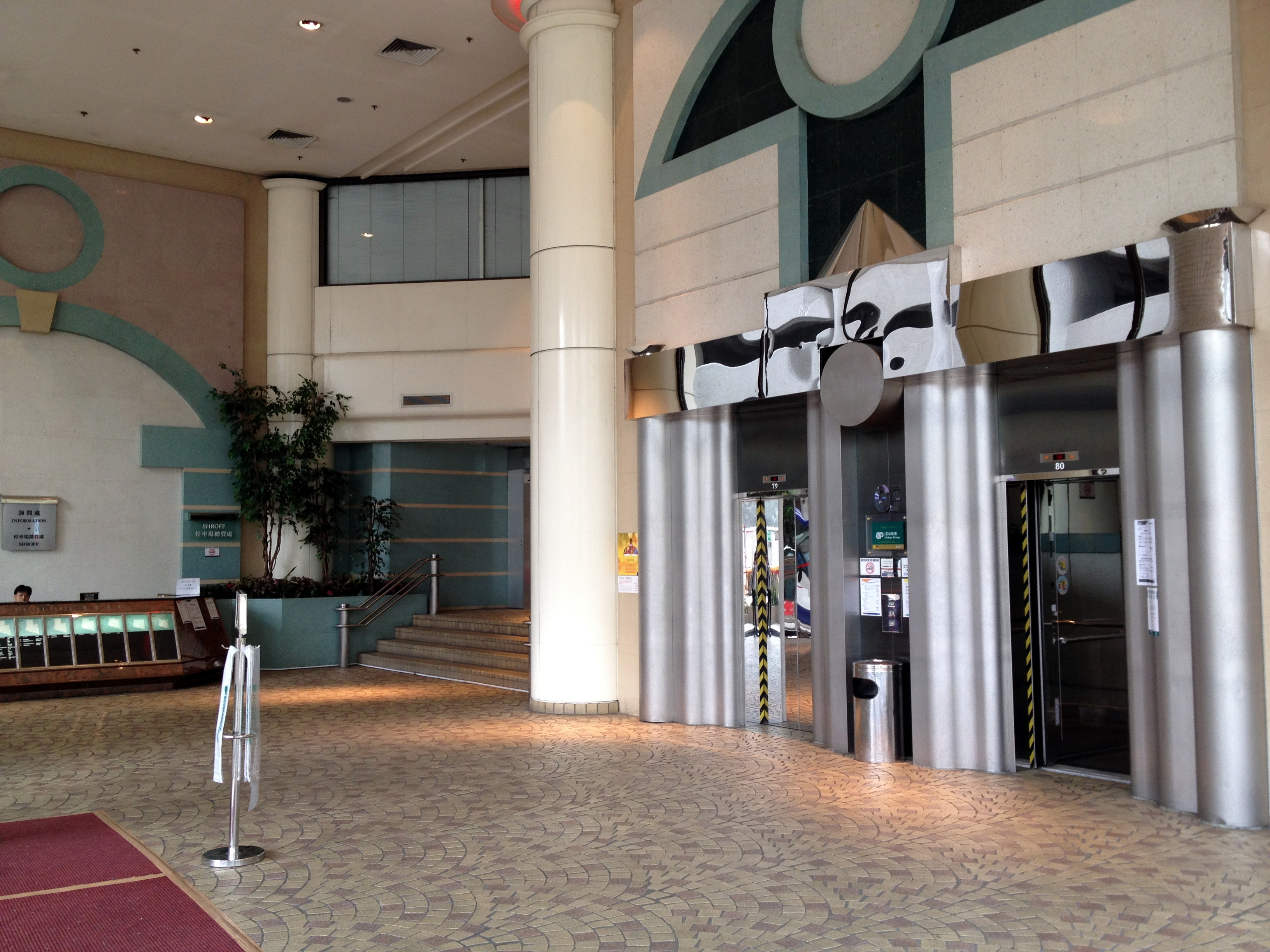 Riviera Plaza Void